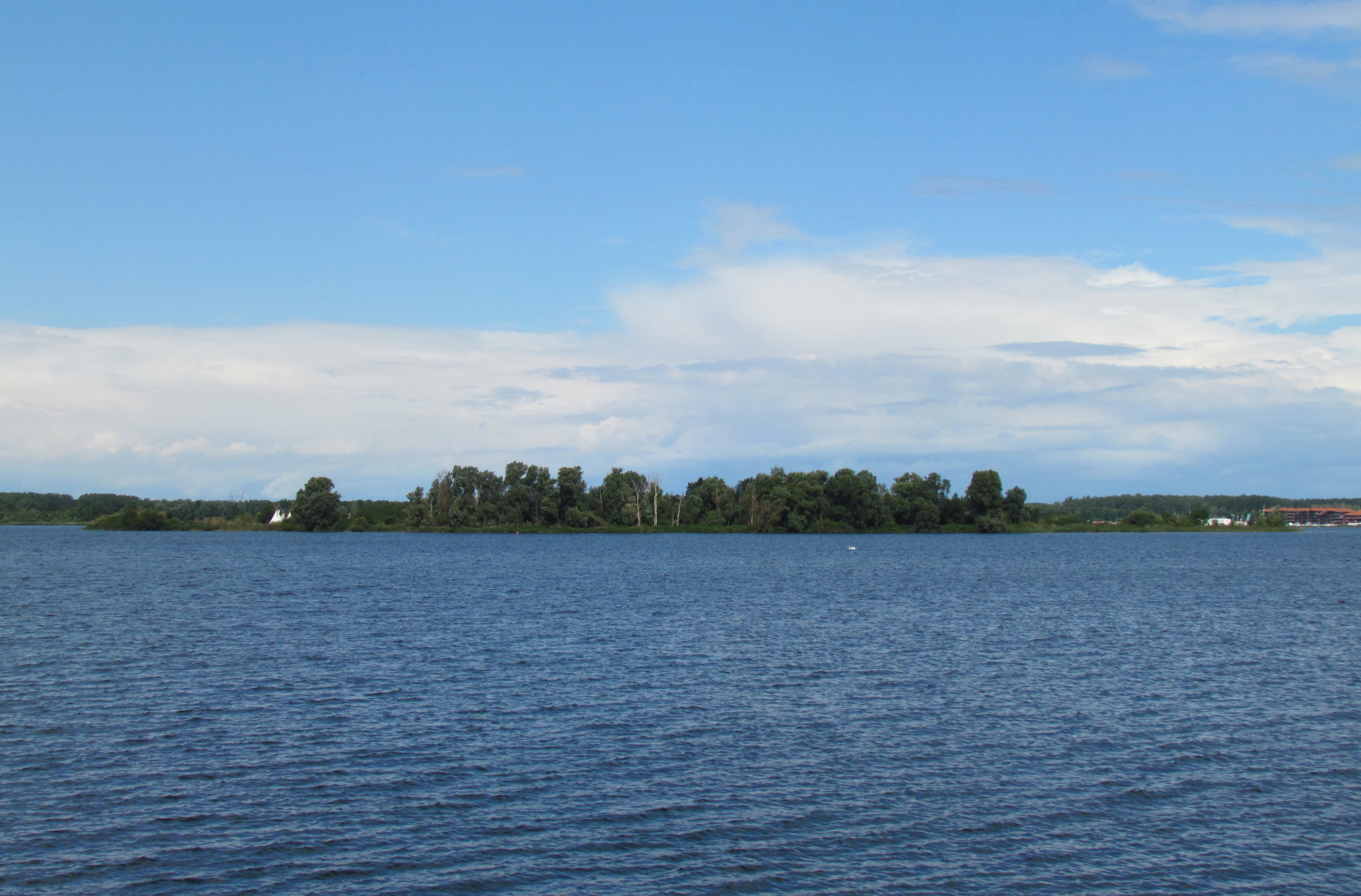 De Kluut, eiland in het Veluwemeer tussen Harderwijk en Jachthaven Flevostrand